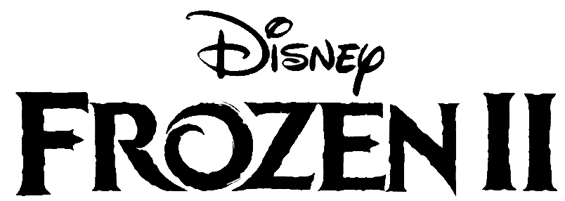 Logo usado para la película de Wal Disney Pictures